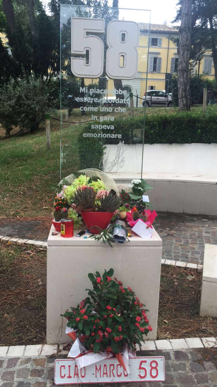 Monumento dedicato a Marco Simoncelli a Coriano, suo paese natale.